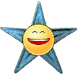 Barnstar